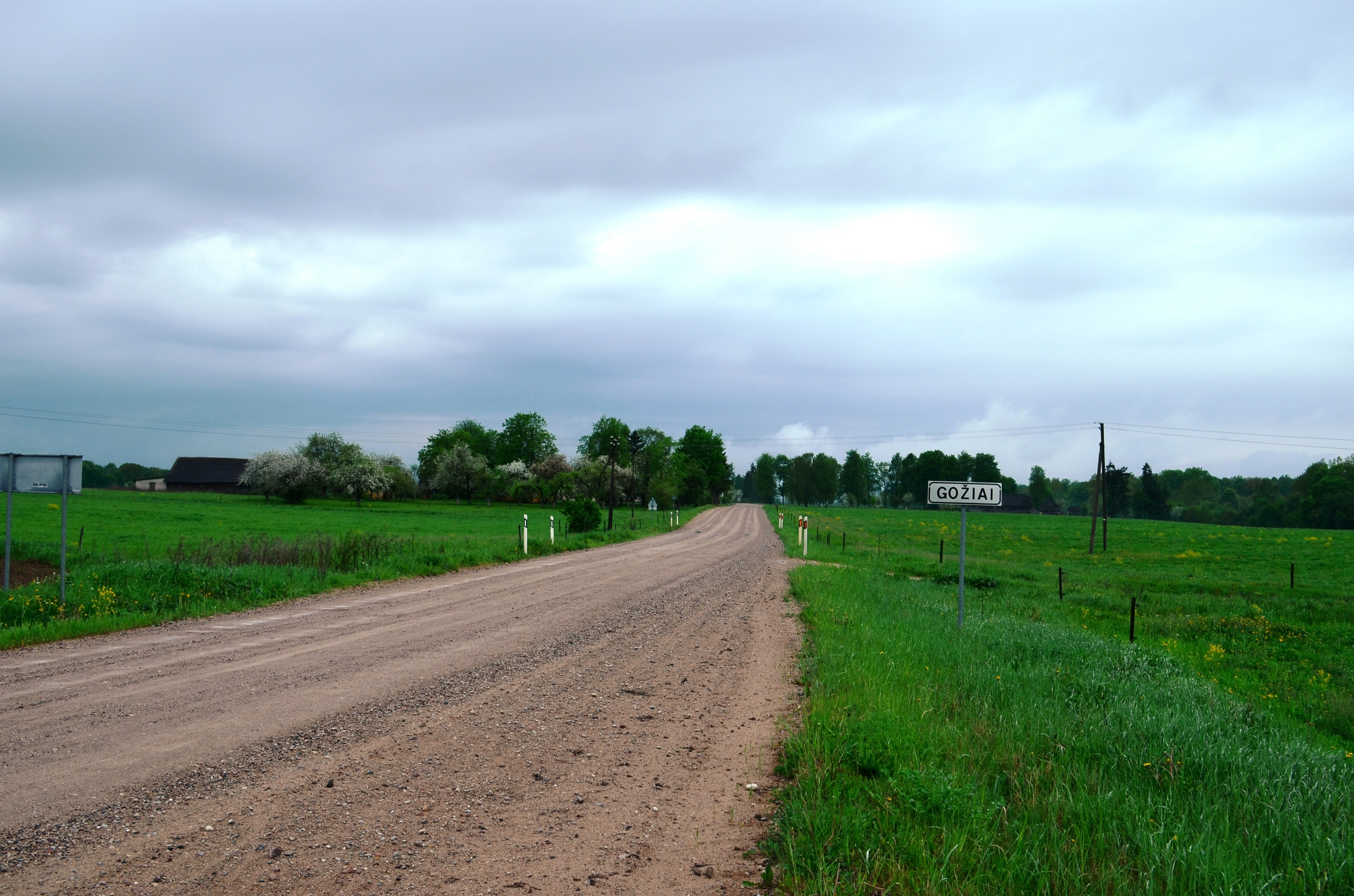 Gožiai, Kėdainių raj.